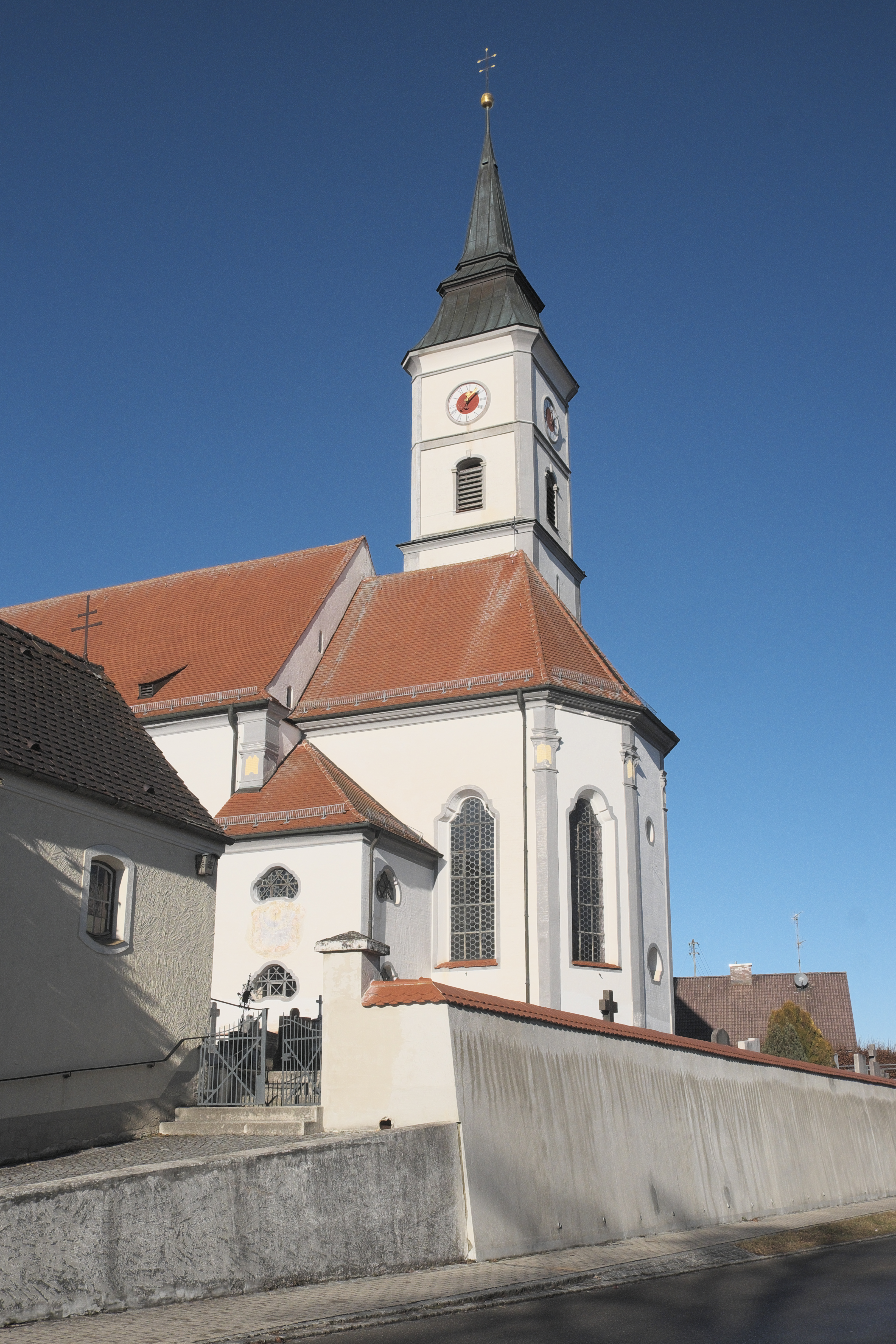 Katholische Pfarrkirche St. Martin in Thaining im oberbayerischen Landkreis Landsberg am Lech (Bayern/Deutschland)